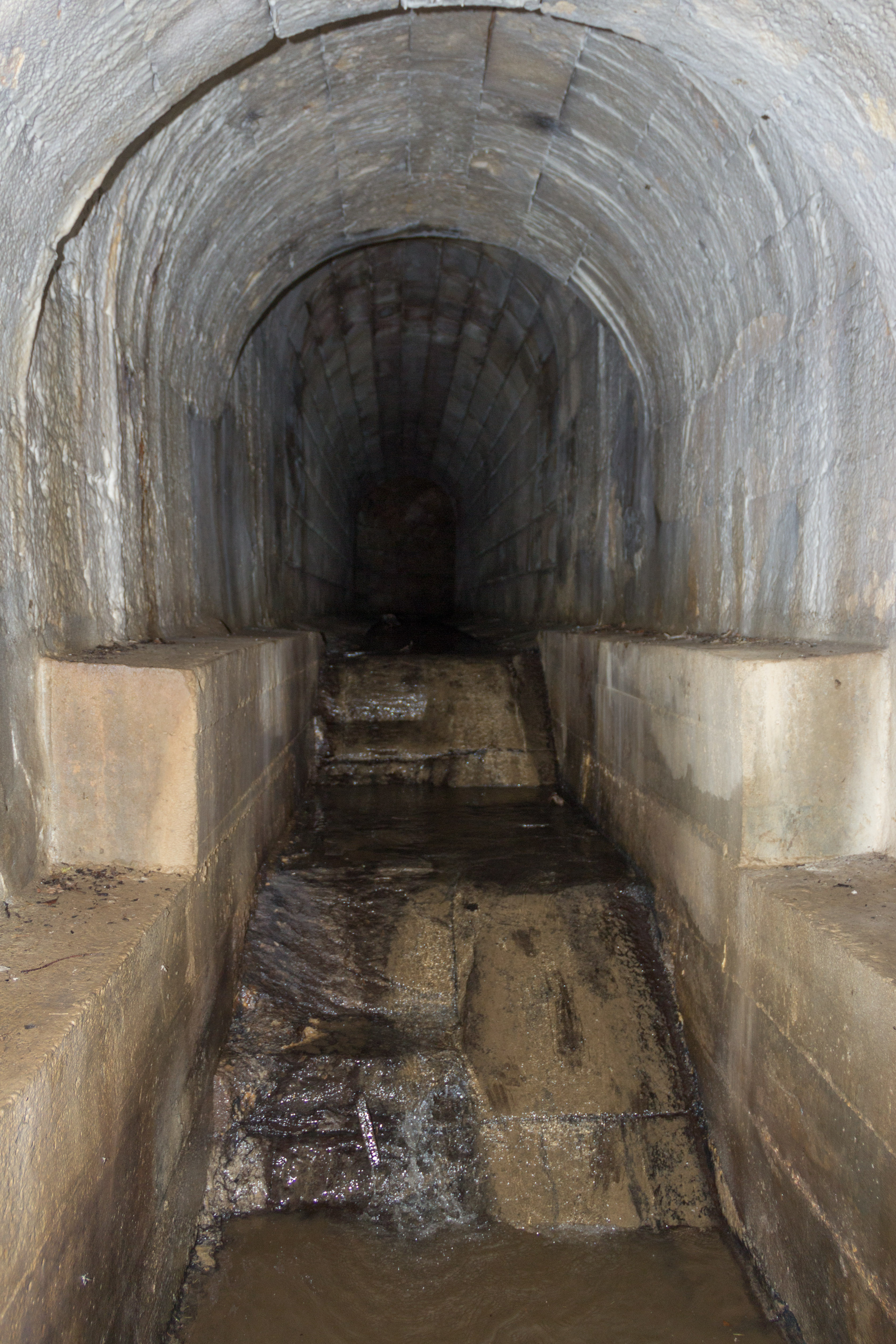 Ludwig-Donau-Main-Kanal, Schwarzenbach, Distellochdamm, Innen, Treppen am Auslass